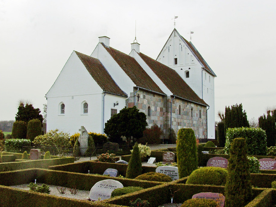 fra nordøst